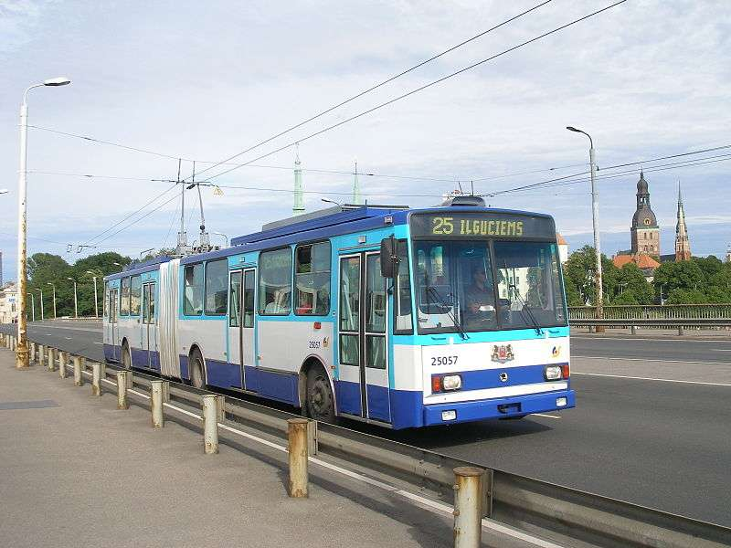 25. maršruta trolejbuss uz Vanšu tilta